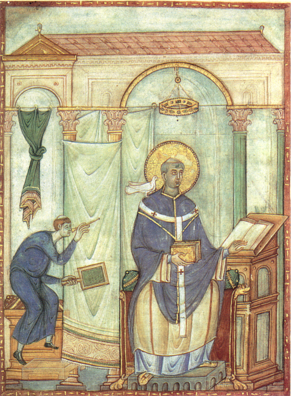 das sogenannte Gregorblatt